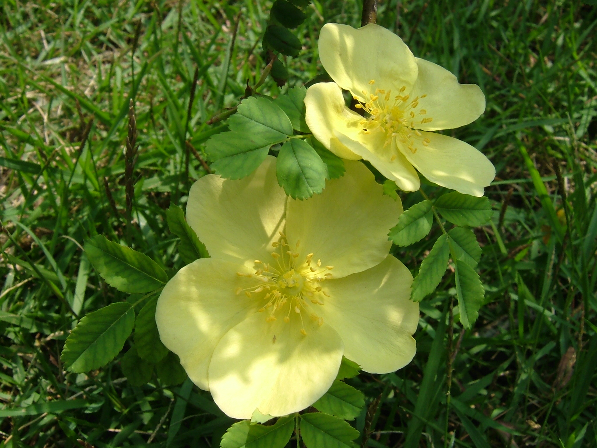 ロサ ユゴニス Rosa hugonis